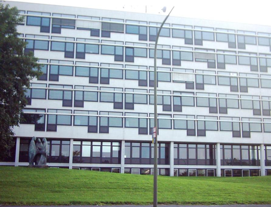 Fachhochschule Südwestfalen, Standort Hagen, zuvor Märkische Fachhochschule